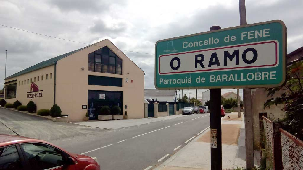 Vista do Ramo, Fene.